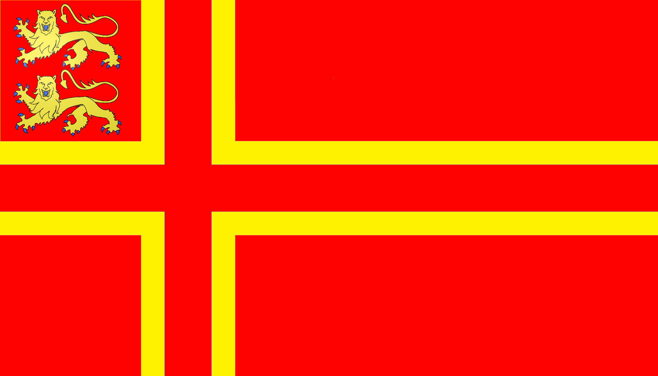 Drapeau Normand de la ville natale de Guillaume le Conquérant et ses origines scandinaves.